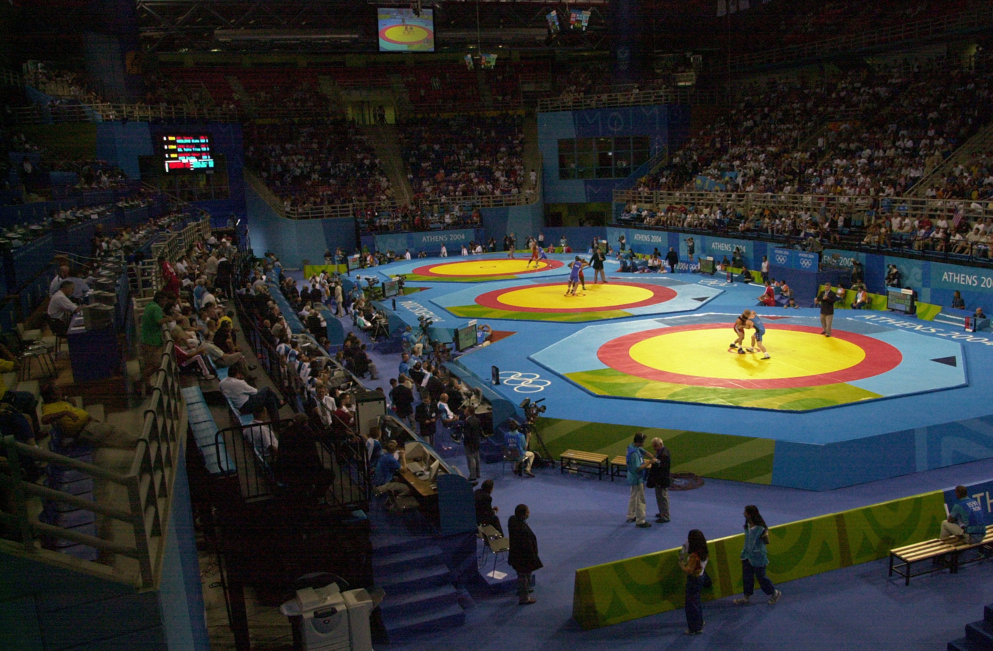 Ano Lioussia Olympic Hall Sgt. Oscar Wood, U.S. Army World Class Athlete Program, Fort Carson, Colo., (near ring) wrestles Mkkhitar Manukyan from Kazakhstan for the final pool round in 66kg Greco-Roman wrestling at Ano Liossia Olympic Hall during the 2004 Olympics in Athens, Greece, Aug. 24, 2004. Sgt. Wood lost to Manukyan in the first round and did not move past the pool round to qualify for the semi-finals. (U.S. Air Force photo by Master Sgt. Lono Kollars) (Released) Photo by: MASTER SGT LONO KOLLARS, Record ID No. (VIRIN): 040824-F-5019K-013